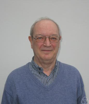 Foto di Michel Duflo